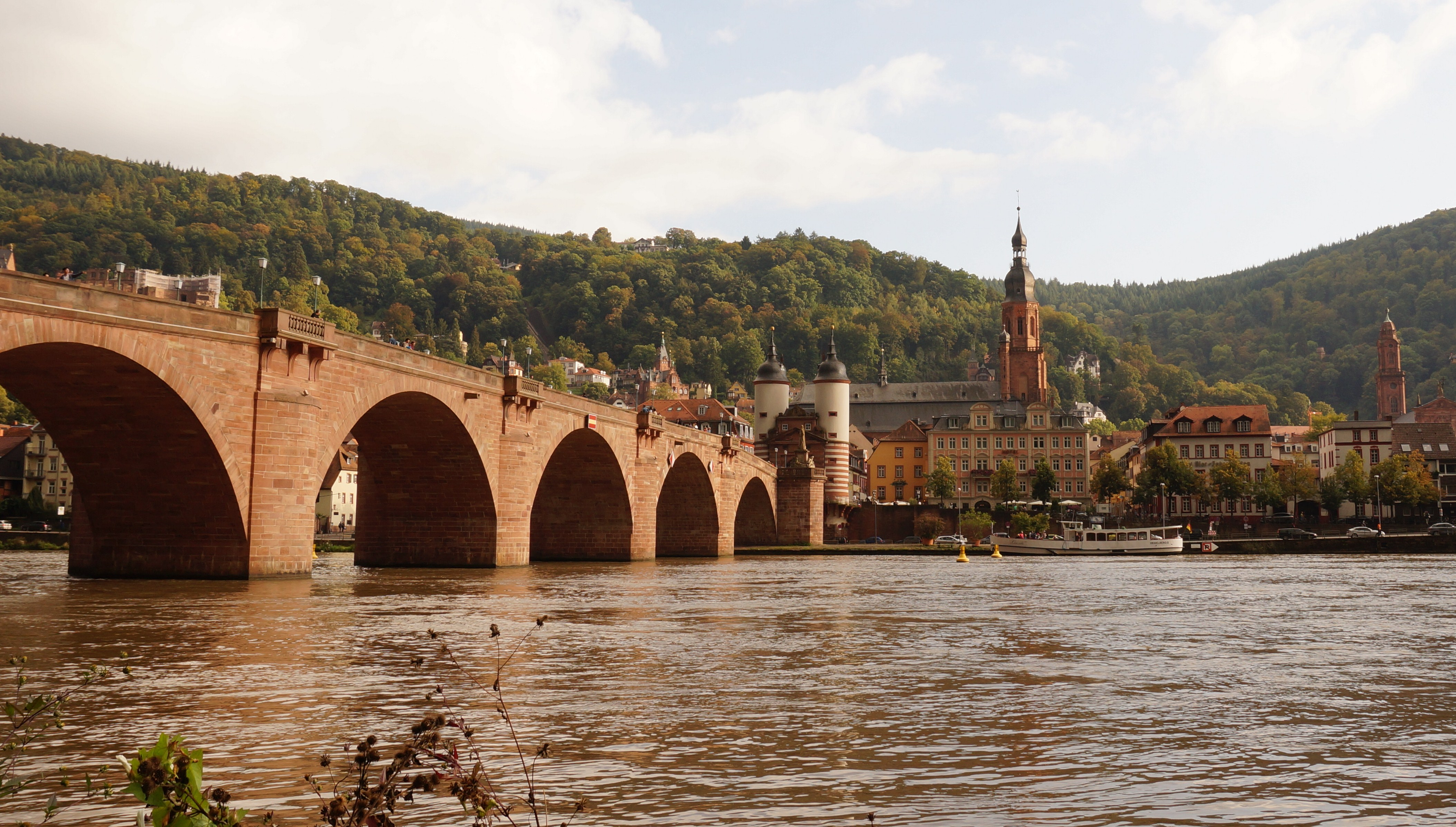 Alte Brücke in Heidelberg / Old Bridge in Heidelberg, "Старый Мост" в г. Гейдельберг